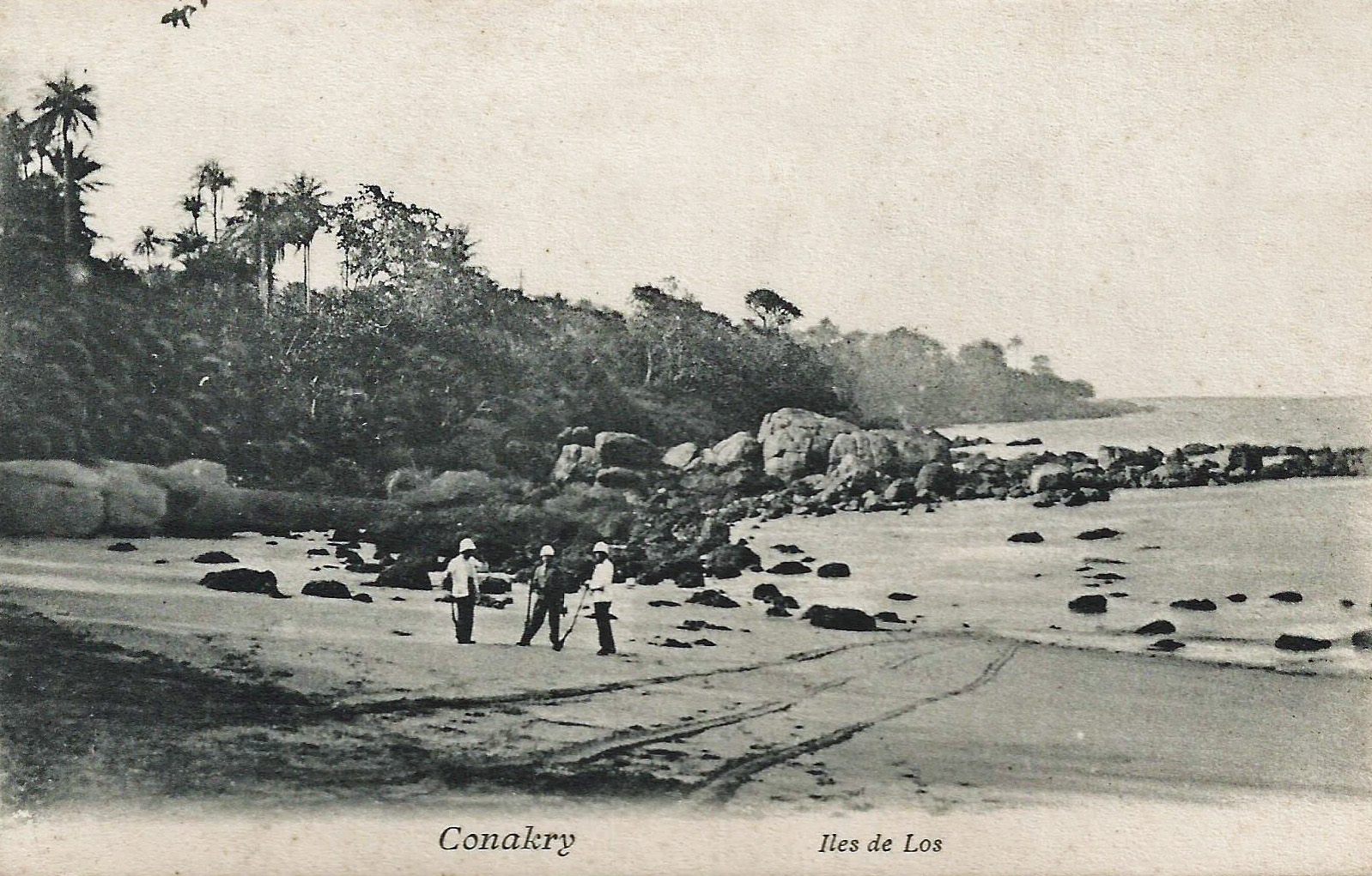 Conakry. Iles de Los. pas de mention d'auteur, d'éditeur ou de date